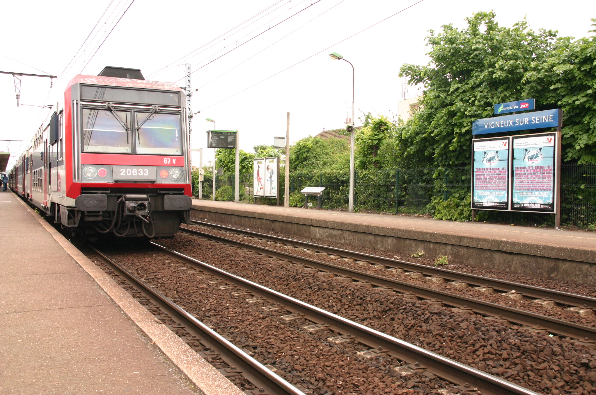 La Gare de Vigneux-sur-Seine, Vigneux-sur-Seine , département l'Essonne, France